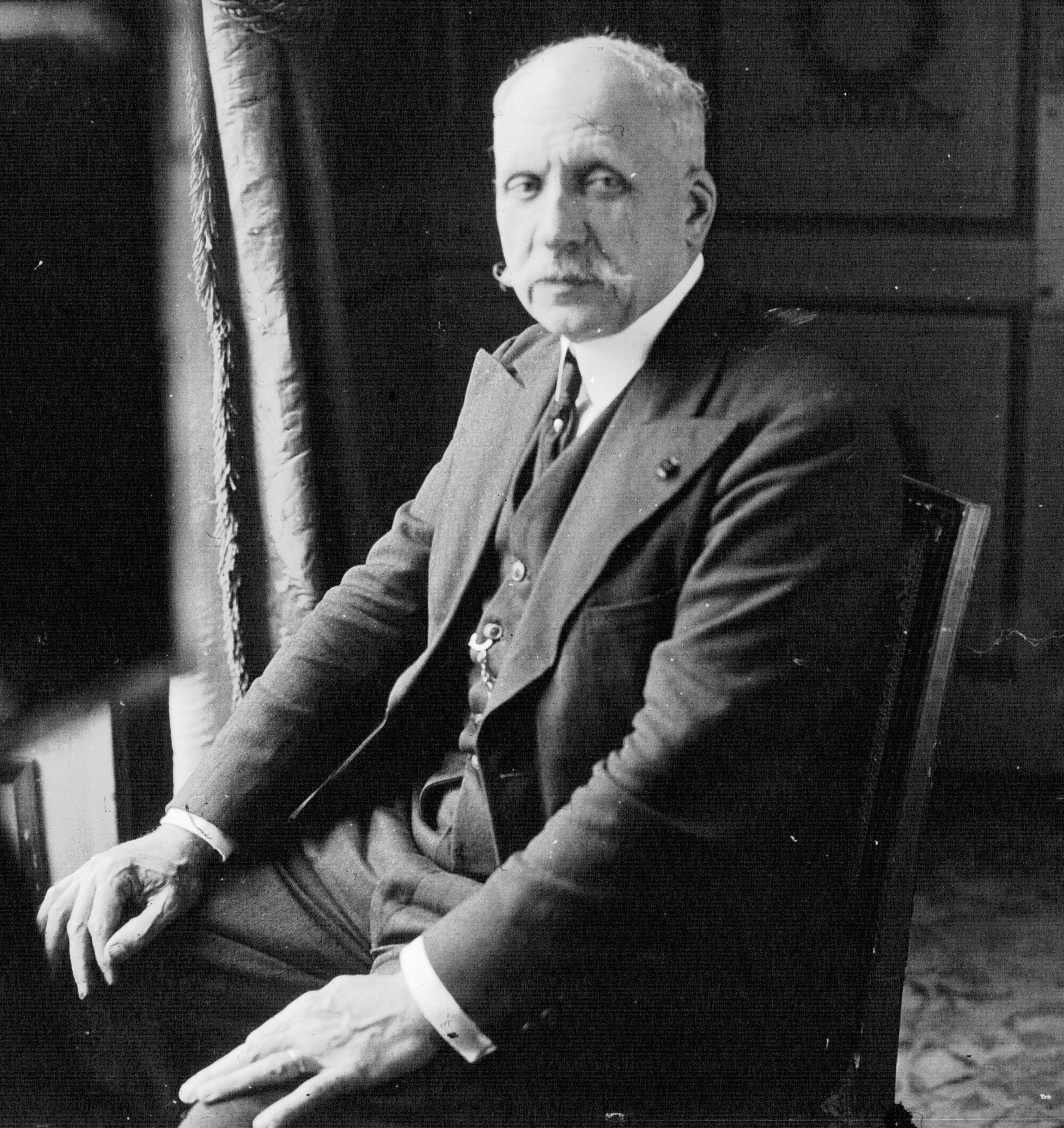 Nouveau ministère (Flandin) : général Maurin, ministre de la Guerre : photographie de presse